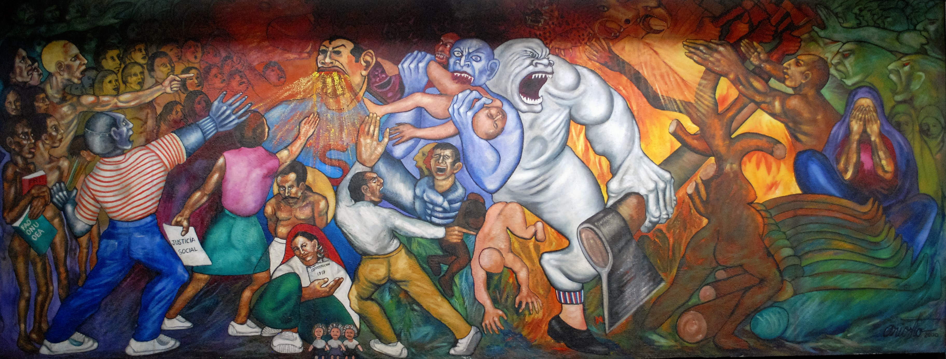 Monstruos de fin de milenio. Autor: Ariosto Otero Reyes. Técnica: Acrílico sobre una base de granito de mármol y paneles de madera. Superficie: 7.32 por 2.74 metros. Estación: La Raza, Línea 5. Metro de la Ciudad de México.